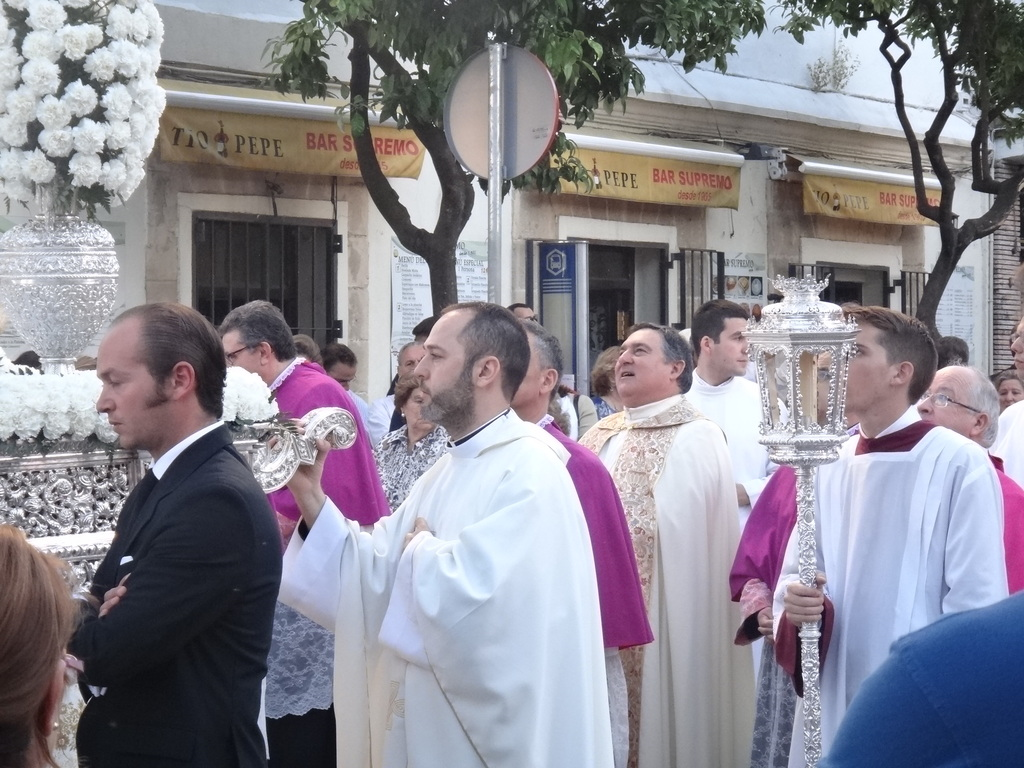 Procesión del Corpus Christi en Jerez de la Frontera (Andalucía, España). Obispo José Mazuelos Pérez